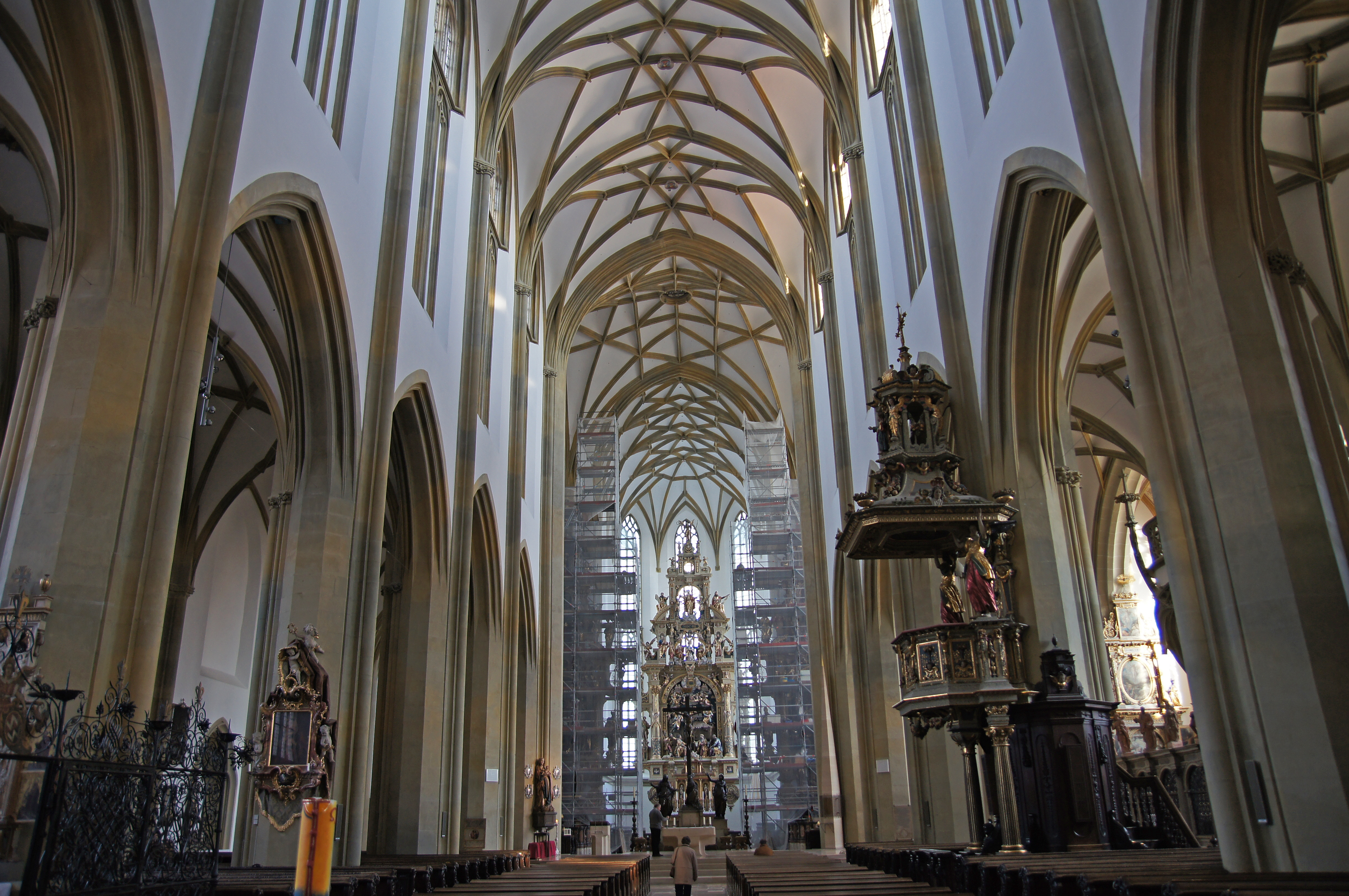 2011-02-26 Augsburg 096 Basilika St. Ulrich und Afra.jpg